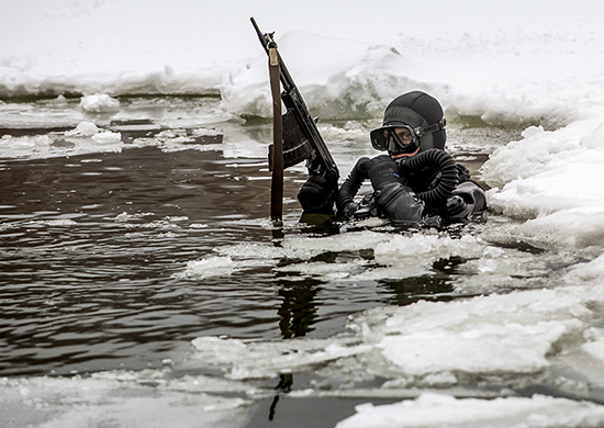 Подразделение специального назначения Вооруженных Силах России